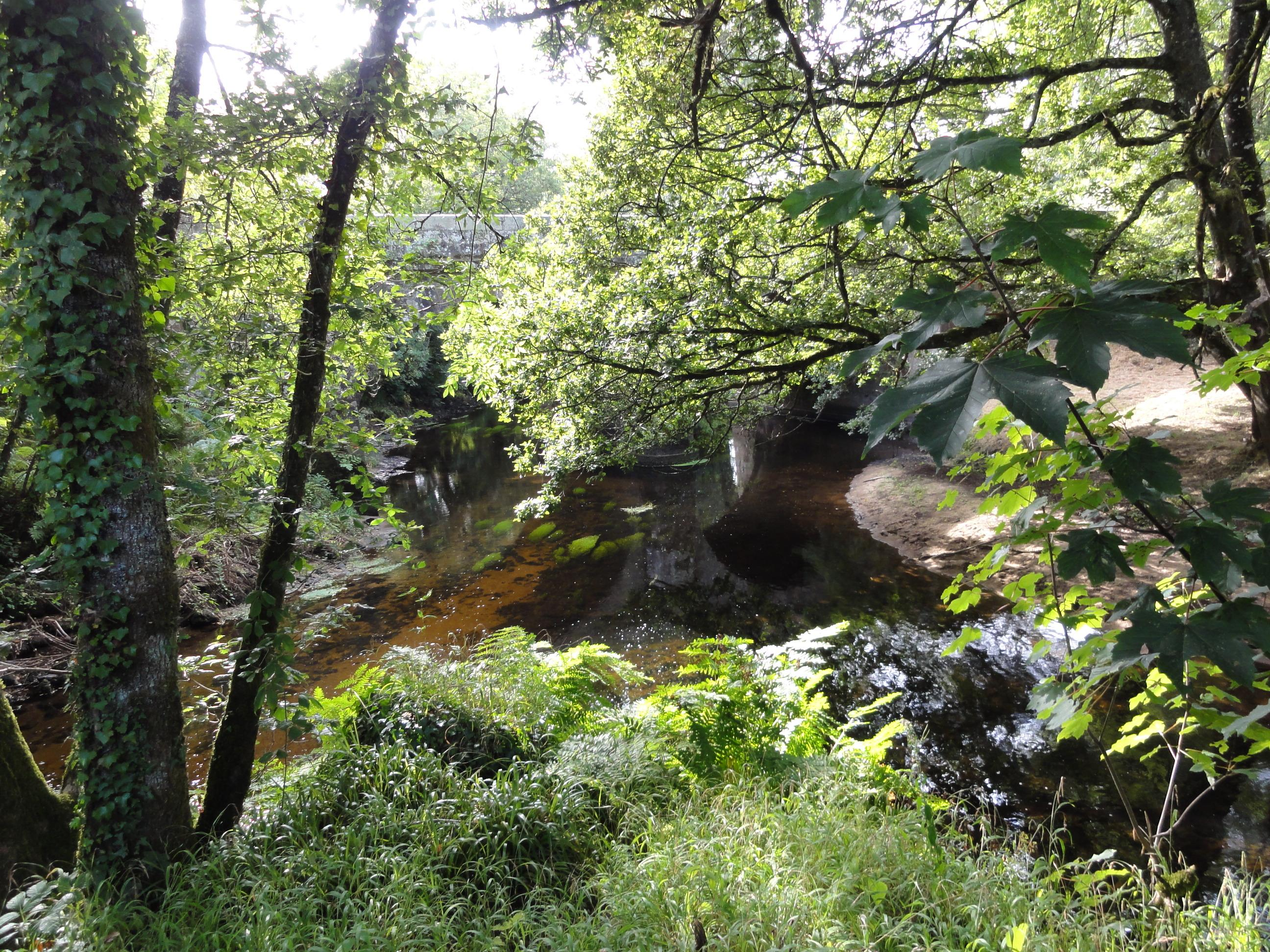 La riviere Aër (à gauche) rejoint l'Ellé (à droite) à Pont-Tanguy, commune de Priziac, département du Morbihan, France